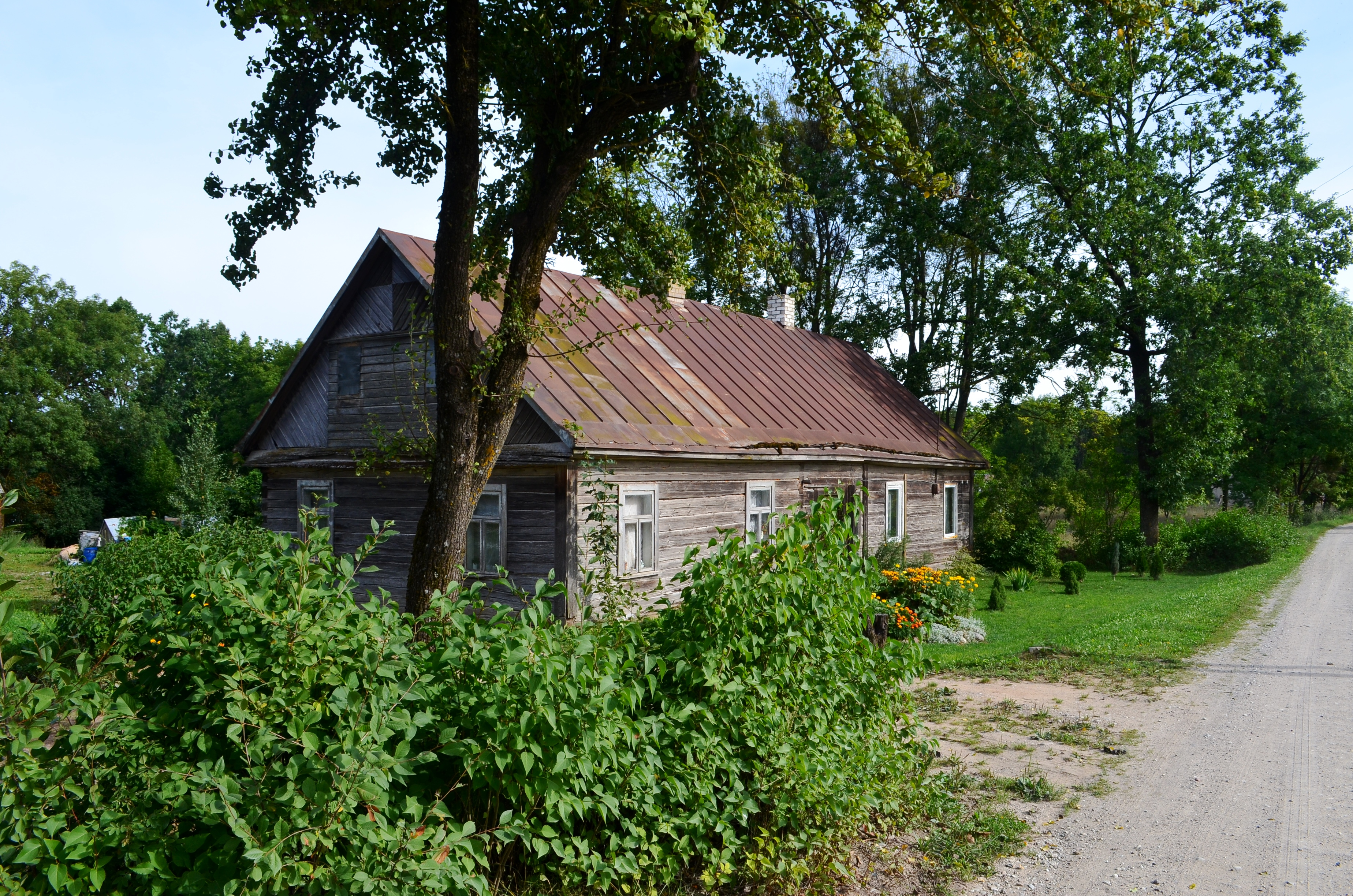 Čiudiškiai, Prienų raj.